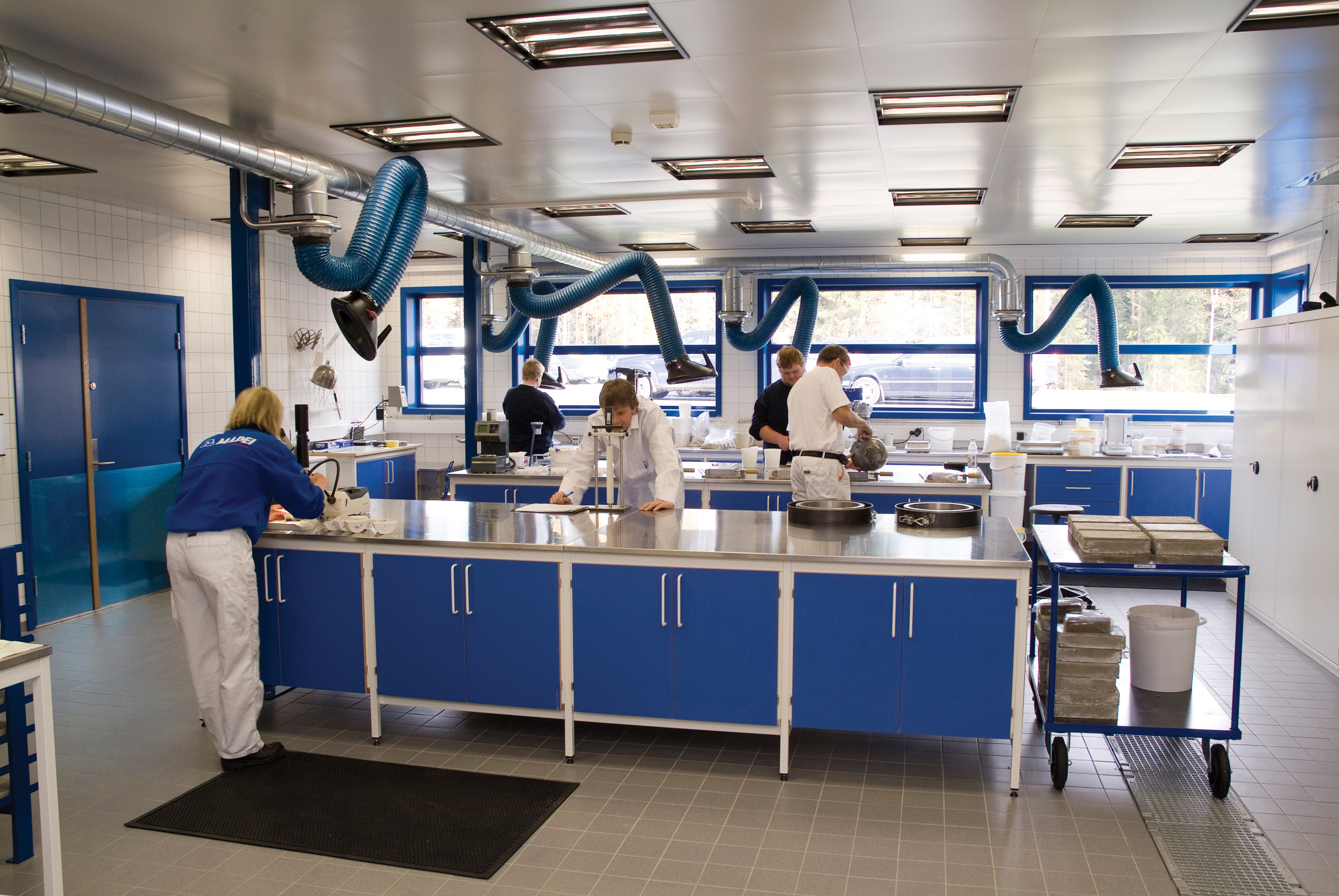 FoU-laben på Sagstua